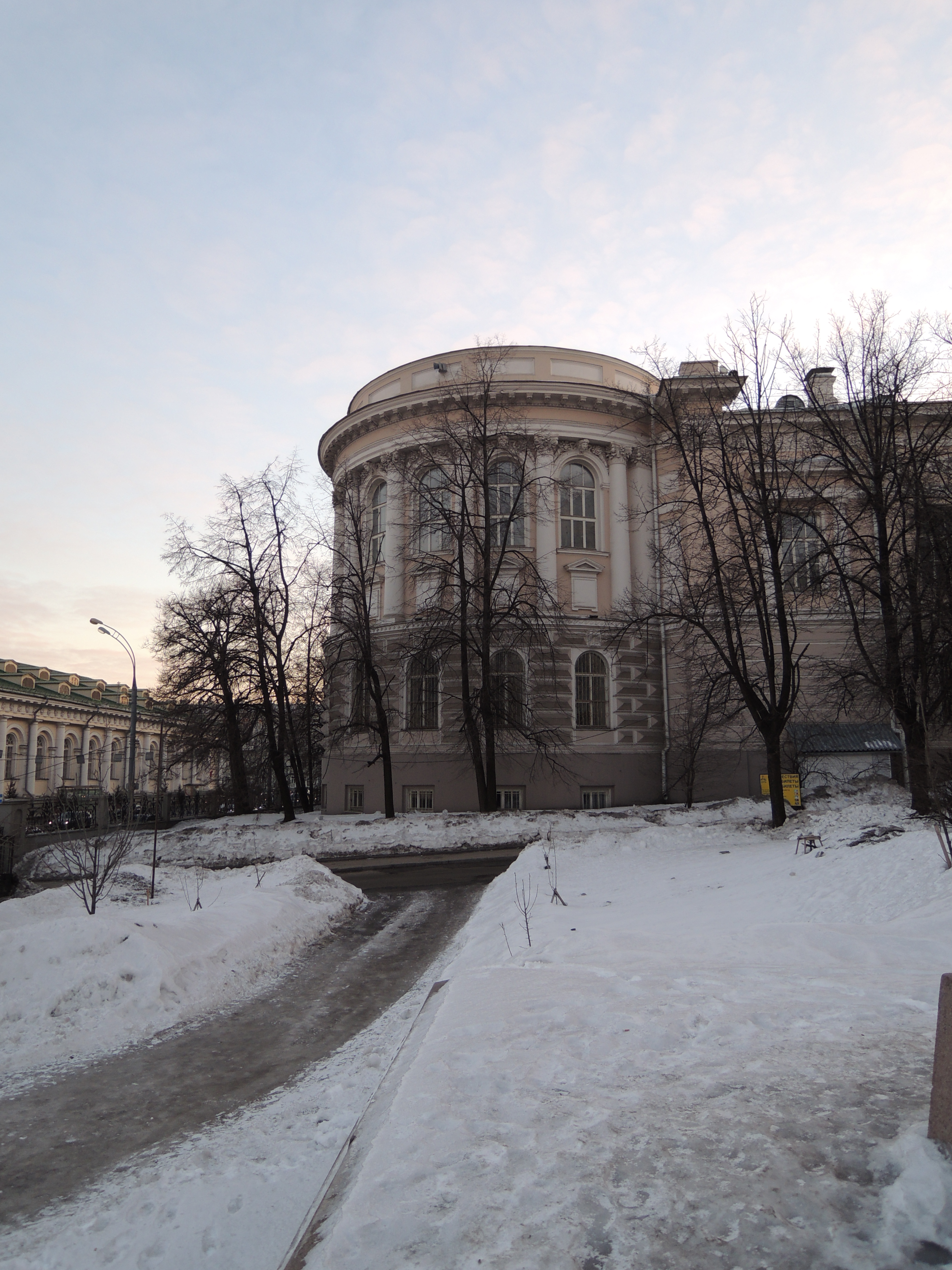 Здание Фундаментальной библиотеки МГУ